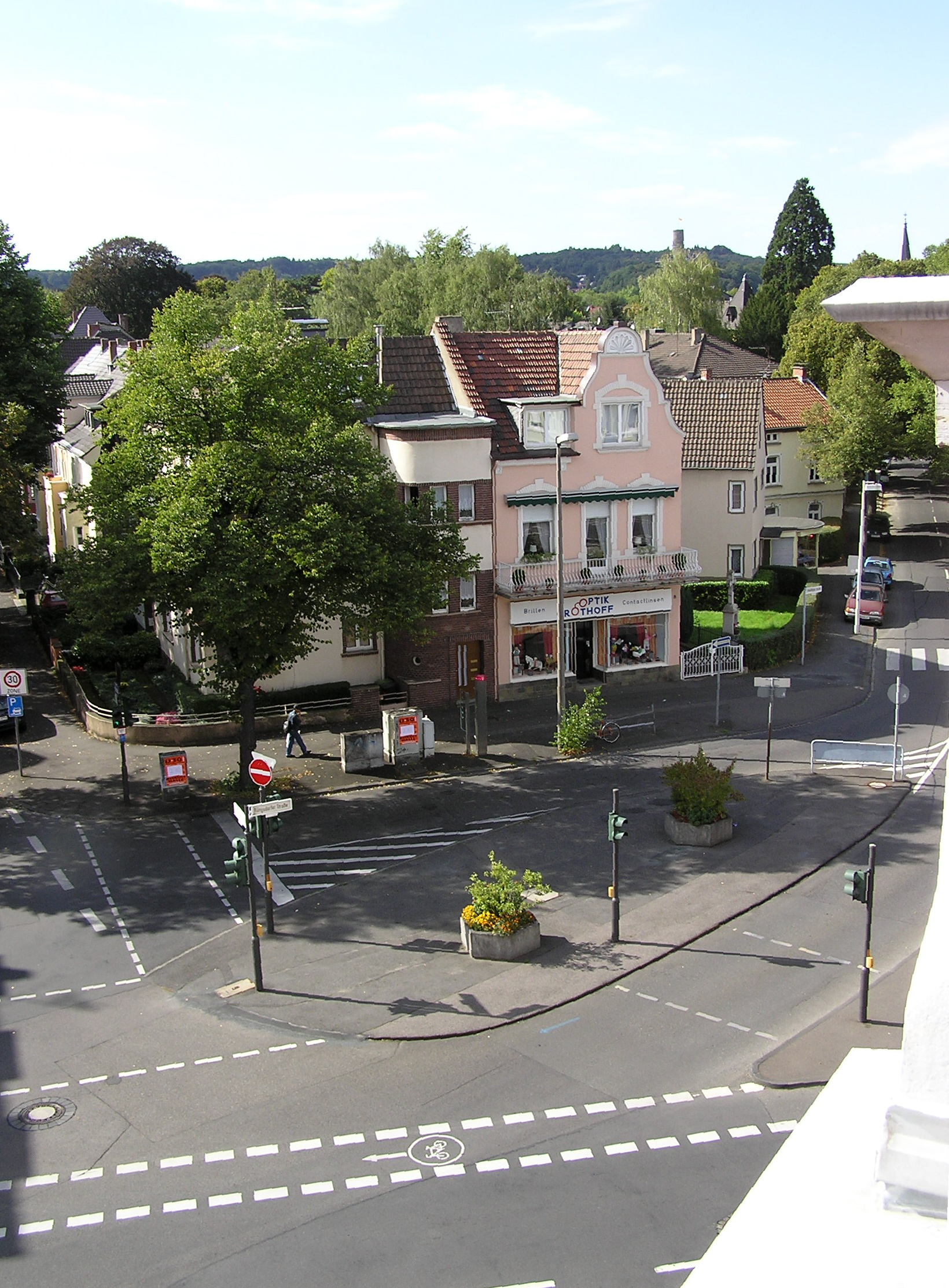 Der Römerplatz in Bonn-Rüngsdorf ist ein wichtiger Verkehrsknotenpunkt des Ortsteils. Nach Norden (hier rechts) führt die Ubierstraße nach Plittersdorf und den Bonner Süden. In die entgegengesetzte Richtung führt die Konstantinstraße nach Mehlem. Die Rüngsdorfer Straße (hier hinten rechts) führt zum Zentrum von Bad Godesberg. Außerdem gehen vom Platz die Karl-Finkelnburg-Straße, die Cäsariusstraße und die Rheinstraße ab. Letztere ist eine der ältesten Straßen Rüngsdorfs. Im Hintergrund ist der Turm der Godesburg erkennbar.